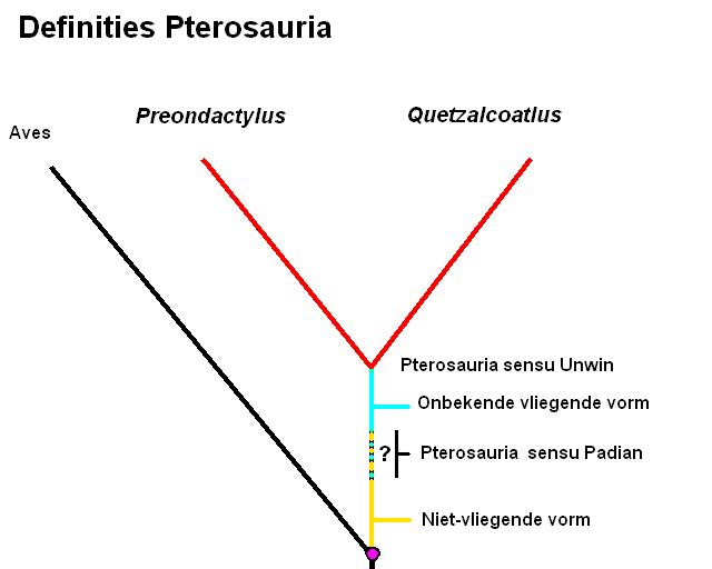 Diagram definities Pterosauria